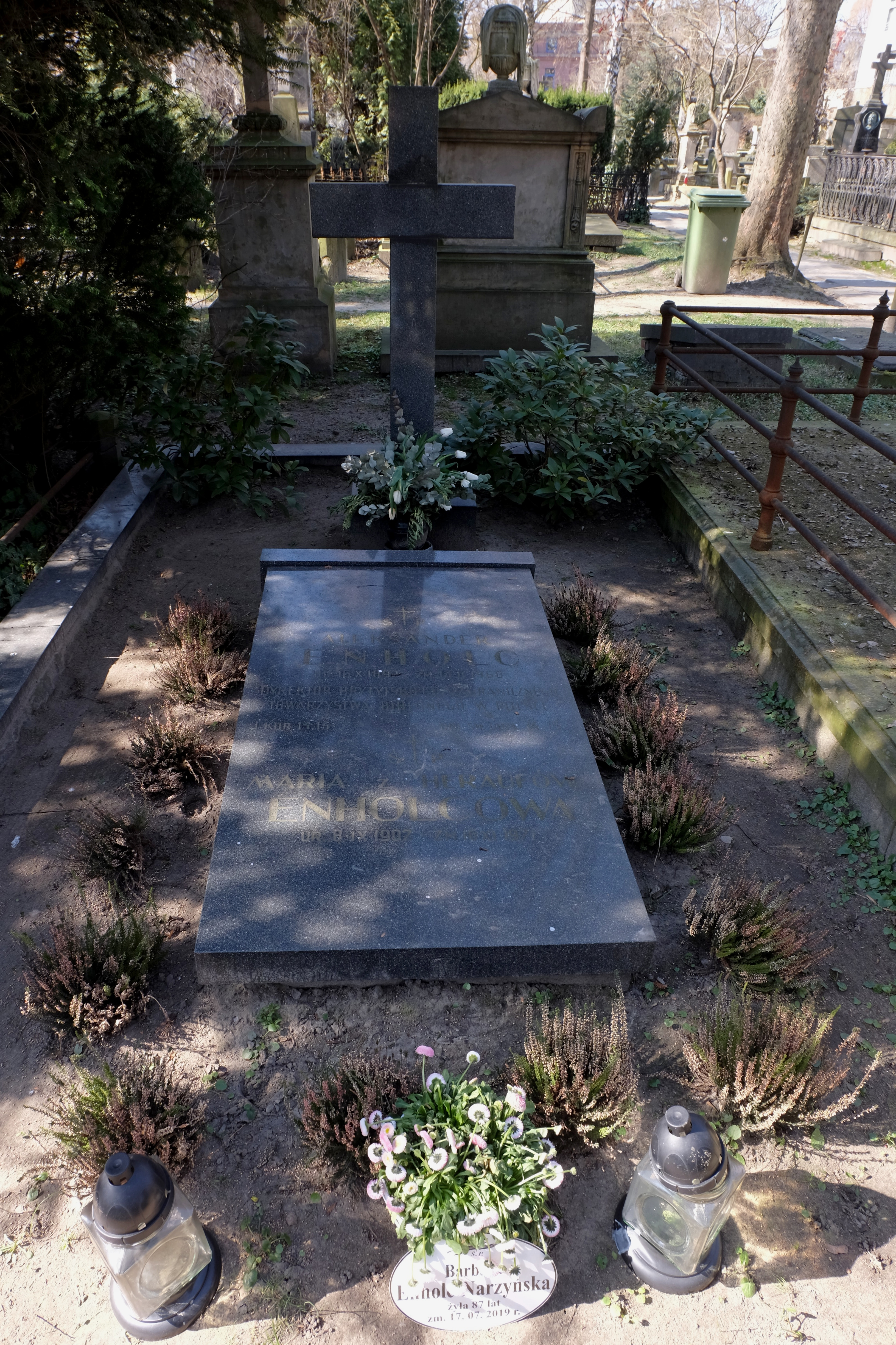 Grób działaczy ekumenicznych Aleksandra Enholca i jego córki Barbary Enholc Narzyńskiej na cmentarzu ewangelicko-reformowanym przy ul. Żytniej w Warszawie